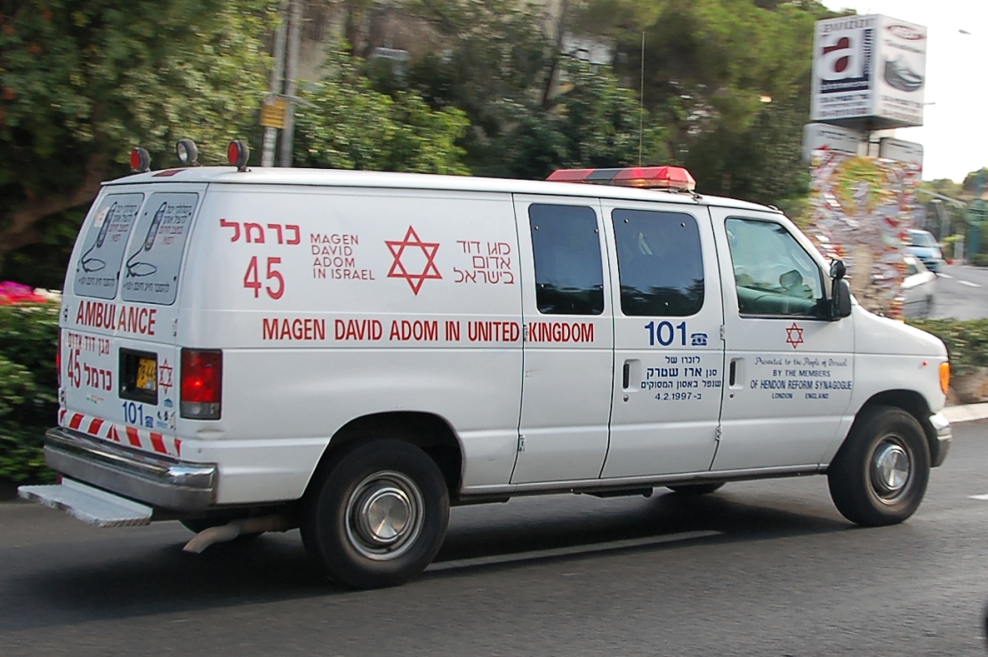 Haifa City 2011